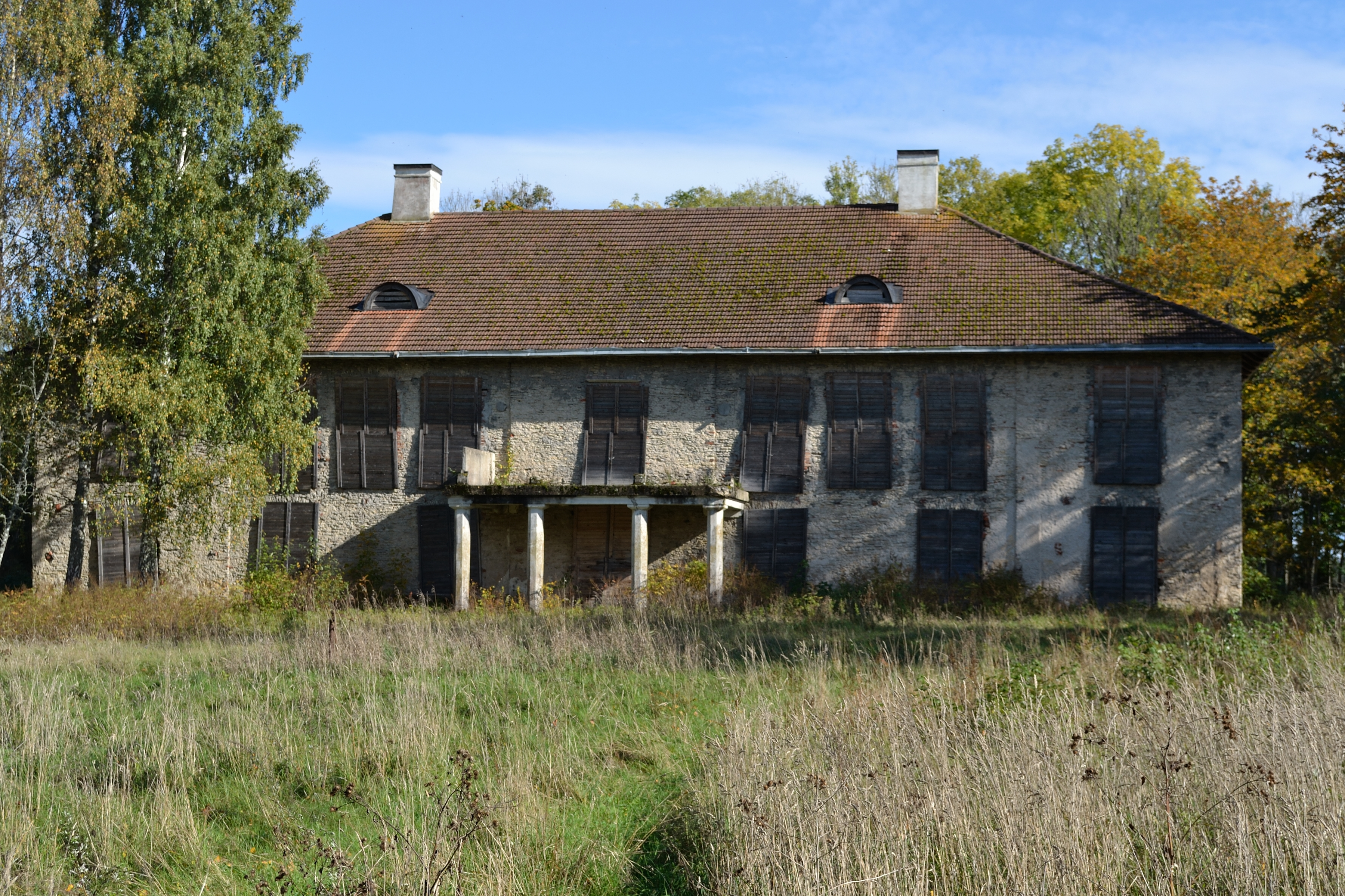 Hagudi mõisa peahoone